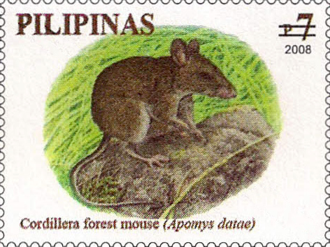 Luzon Montane Forest Mouse (Apomys datae)